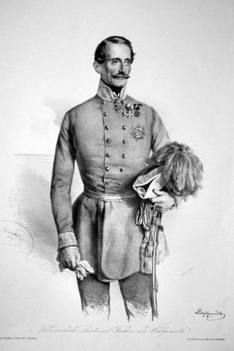 Ludwig von Wohlgemuth, Lithographie von Josef Kriehuber, 1849